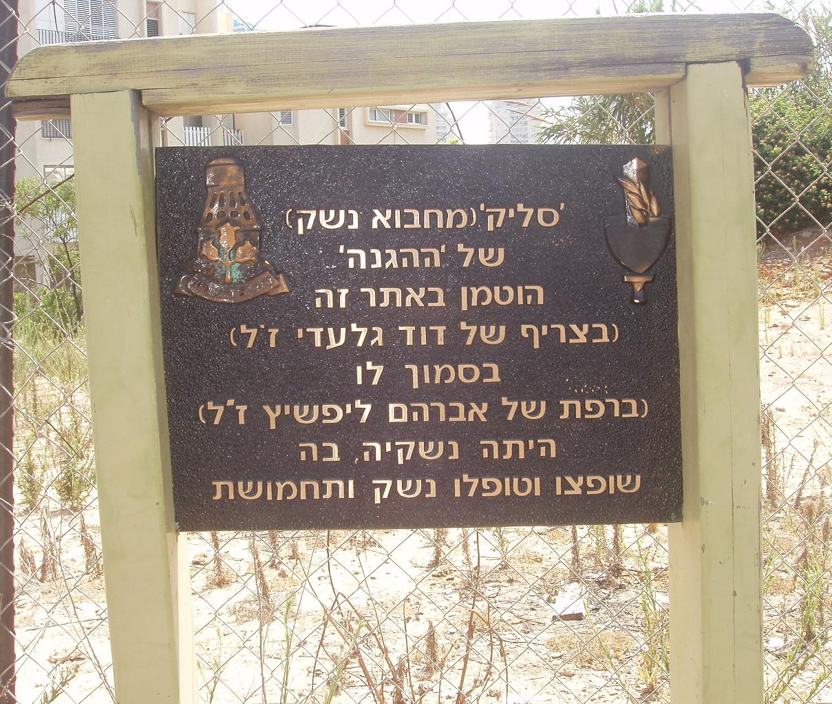 ציון מקומו של סליק ברמת השרון. צילם דוד שי.